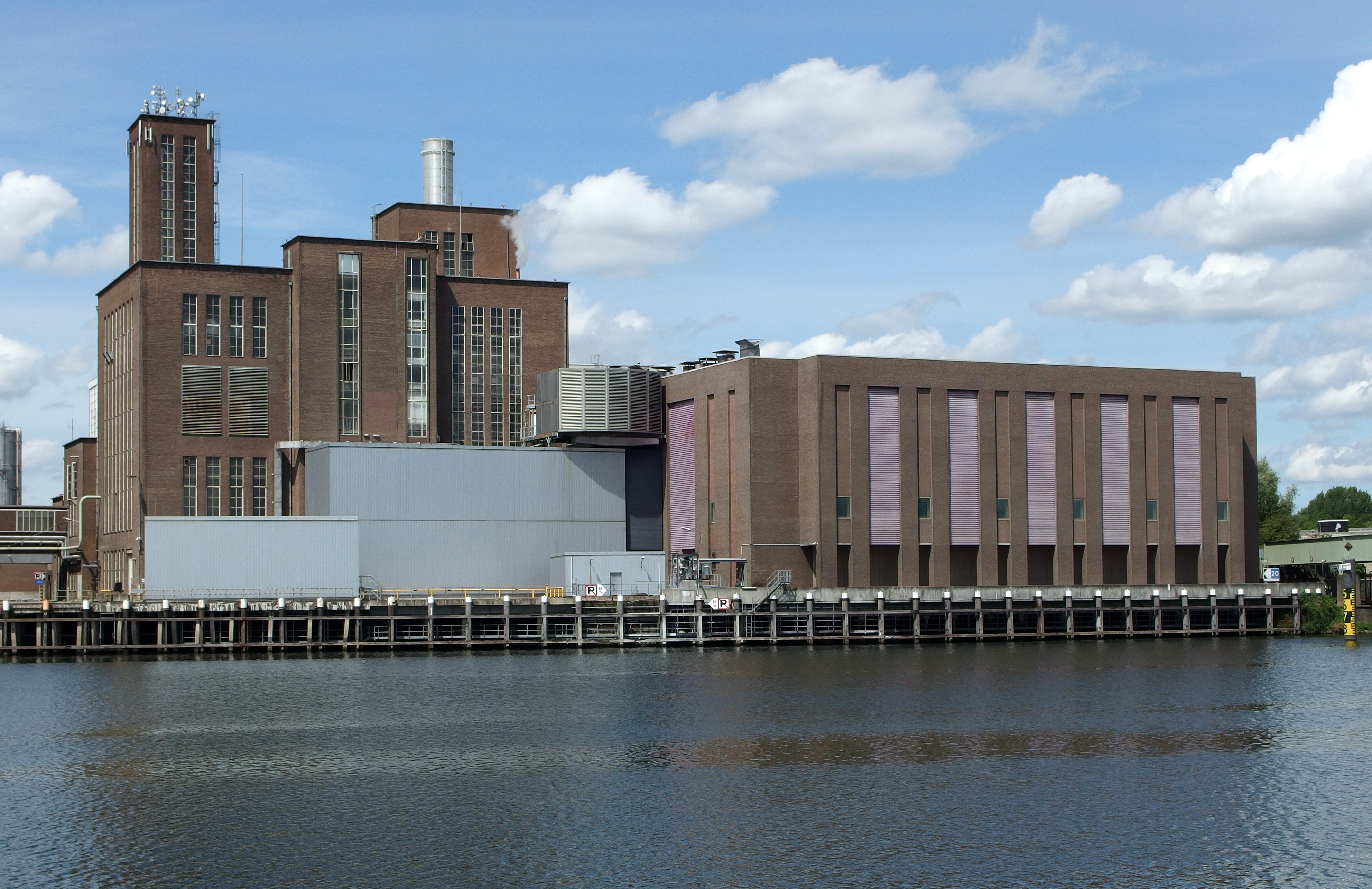 20140525 in Maastricht aan de Maas.